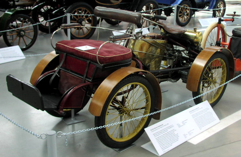 De-Dion-Bouton Quadricycle (1899)